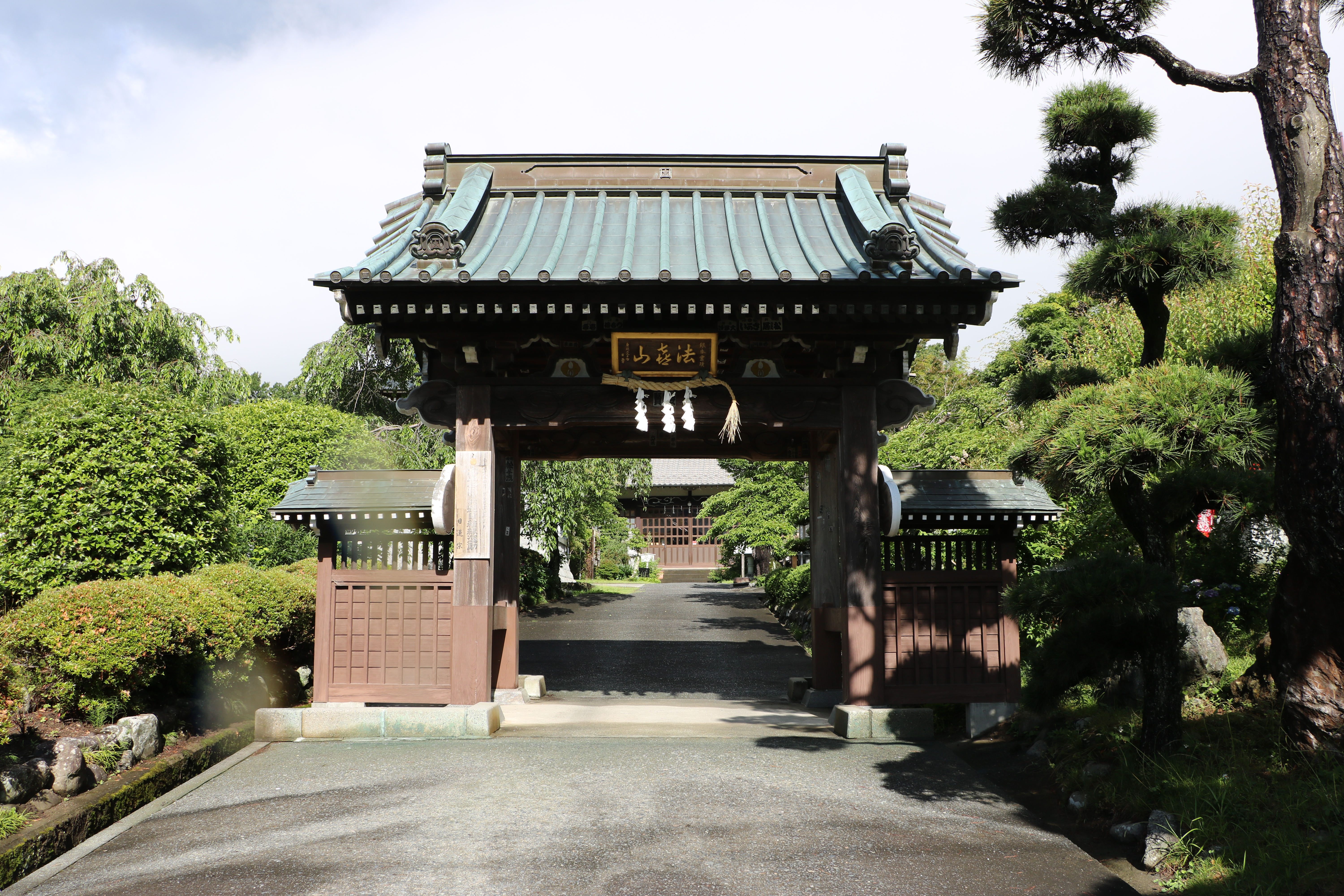 上沢寺山門（山梨県南巨摩郡身延町）